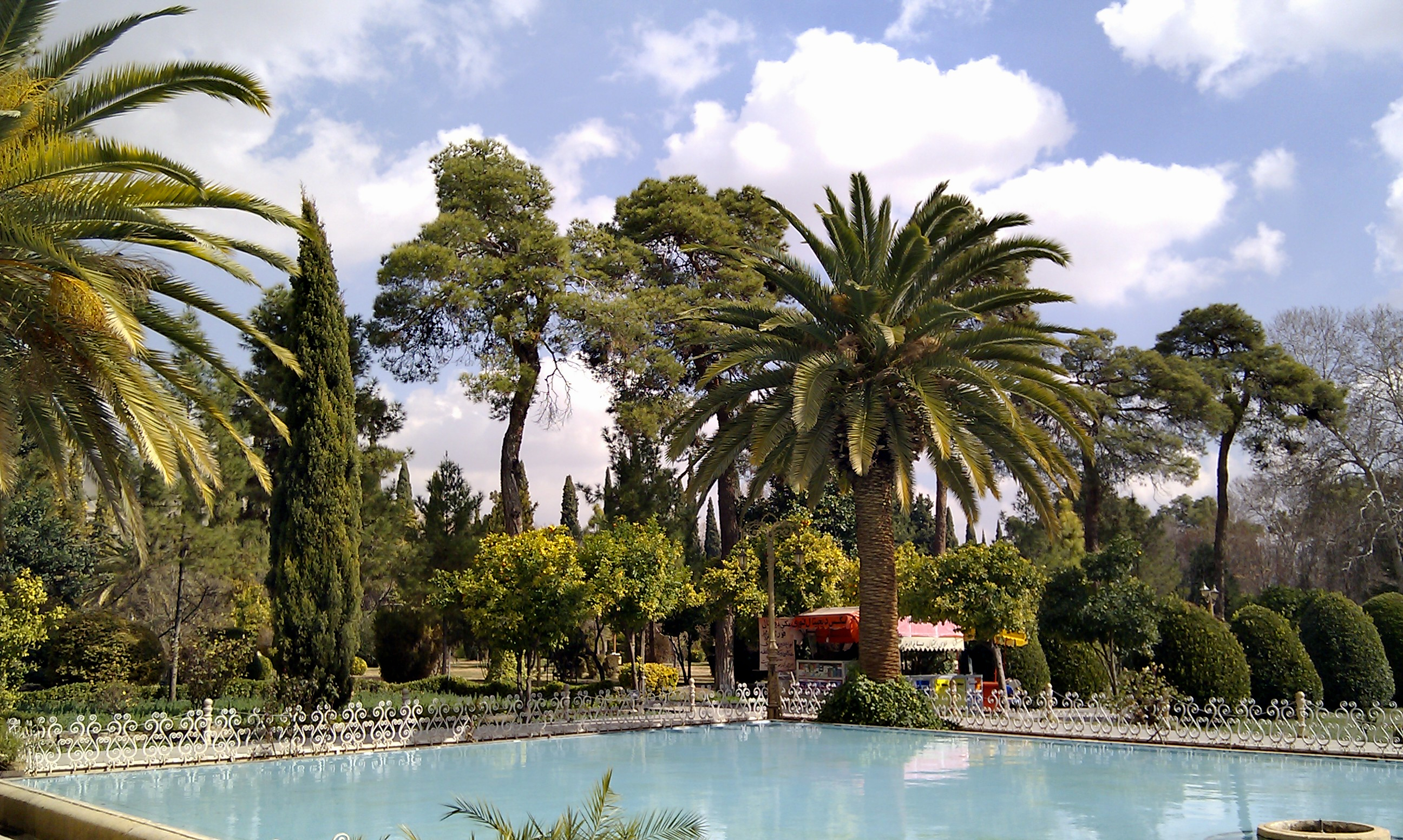 اسمان ابریست،حوض ابی !